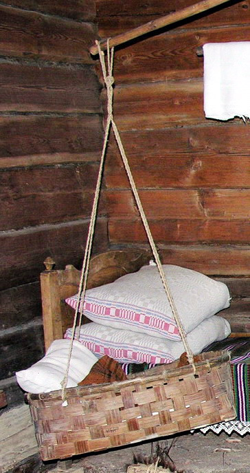 Lopšys 2007 m. balandžio 21 d., Lietuva